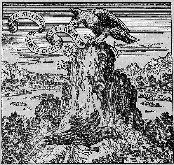 Emblem 43